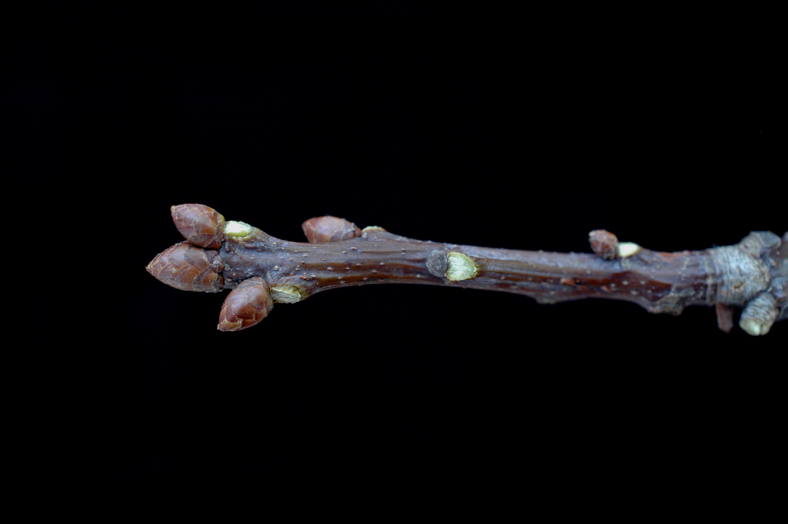 Quercus rubra